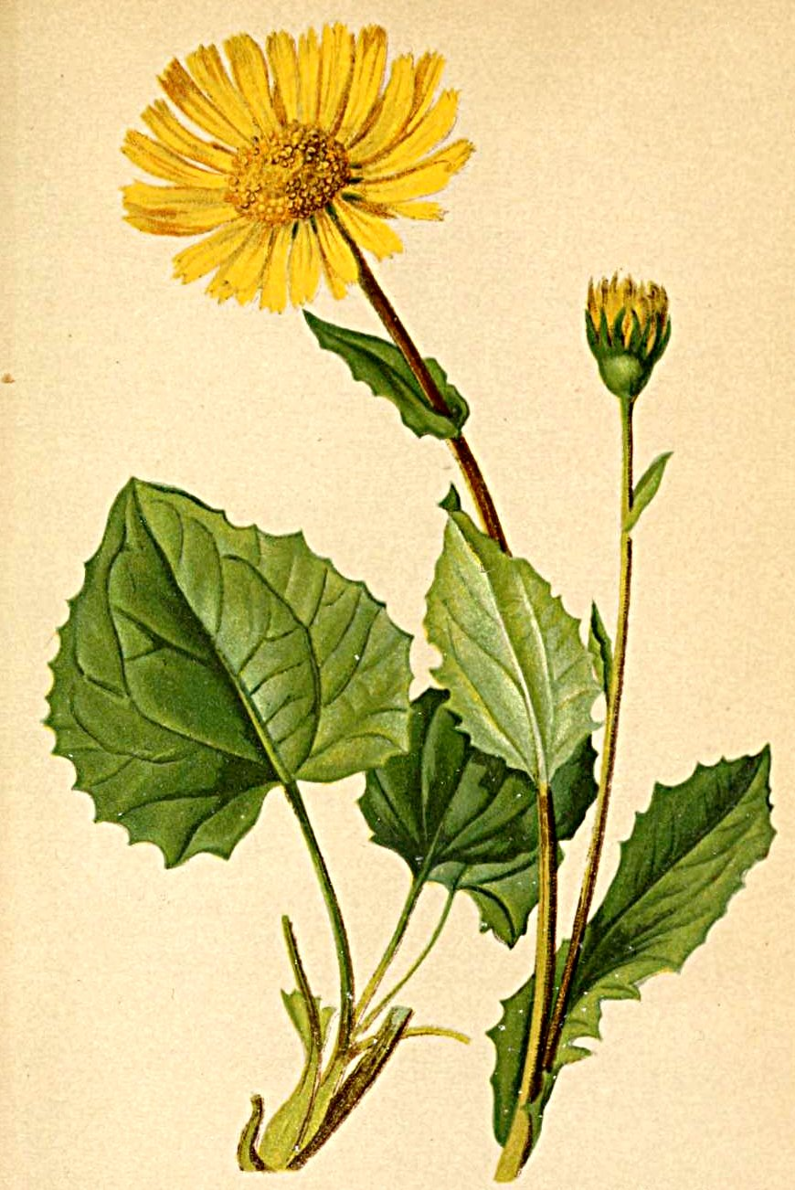 Doronicum cordatum (Doronicum columnae)